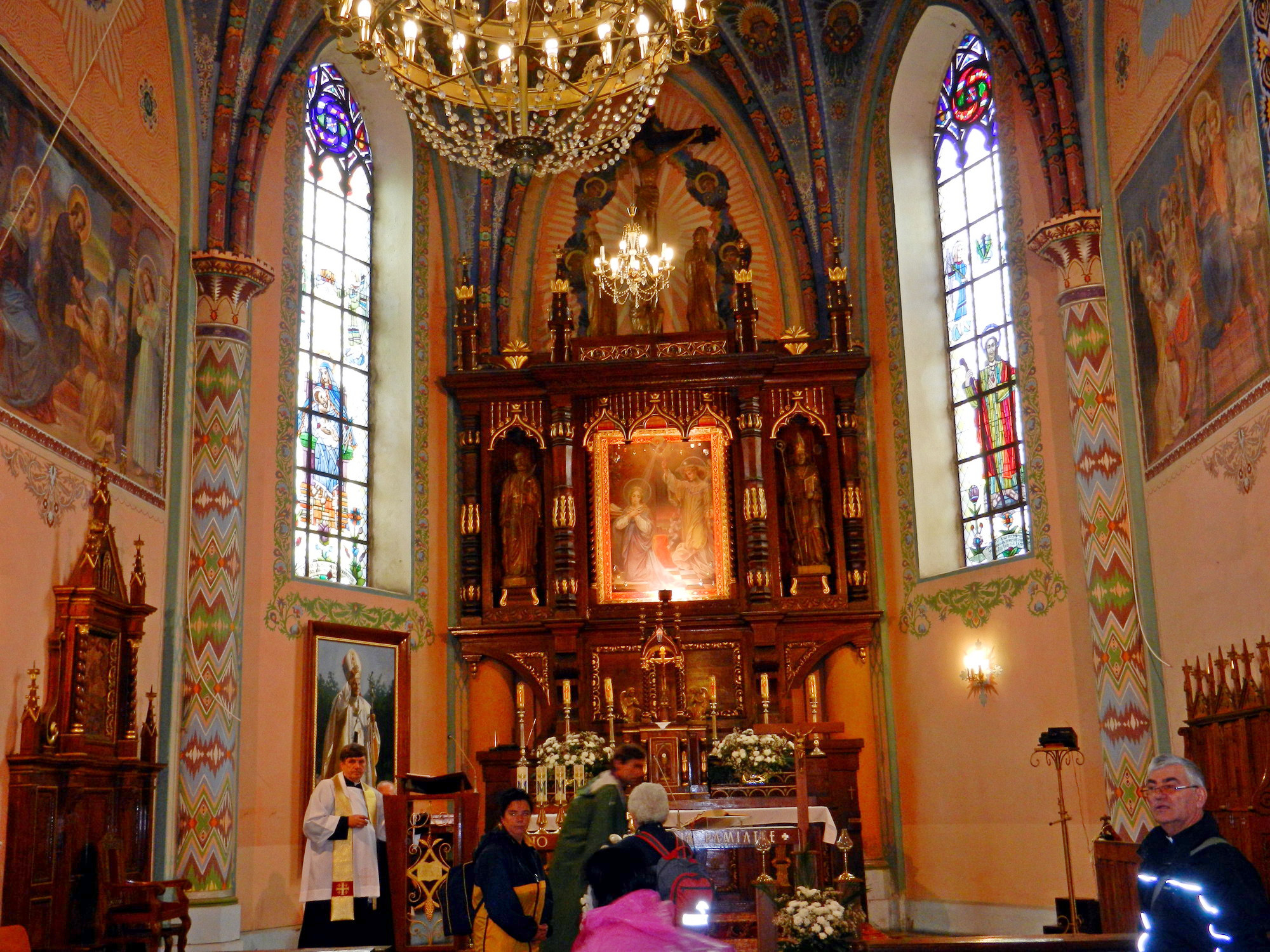 Kościół we wsi Ligowo (powiat sierpecki) - ołtarz.